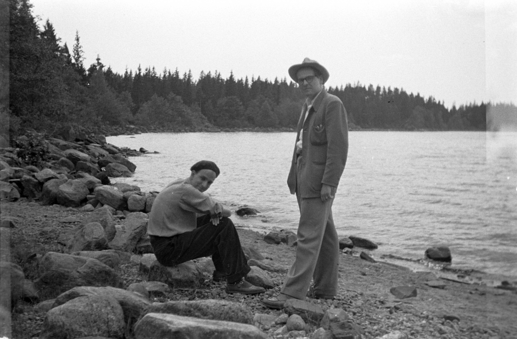 Regissör Ingmar Bergman och inspelningsledare Lars-Eric Kjellgren under produktionen av filmen Hamnstad (1948).